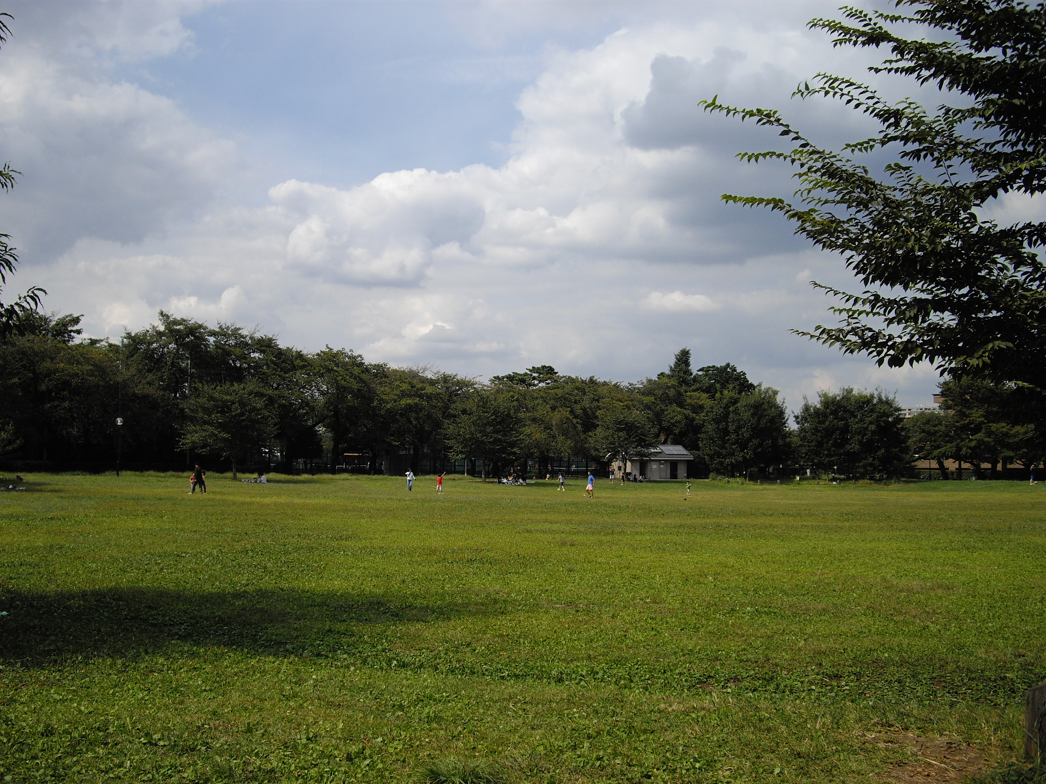 杉並区立柏の宮公園